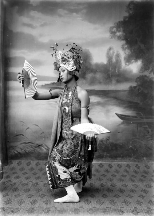 Negatief. Studioportret van een gandrung danseres